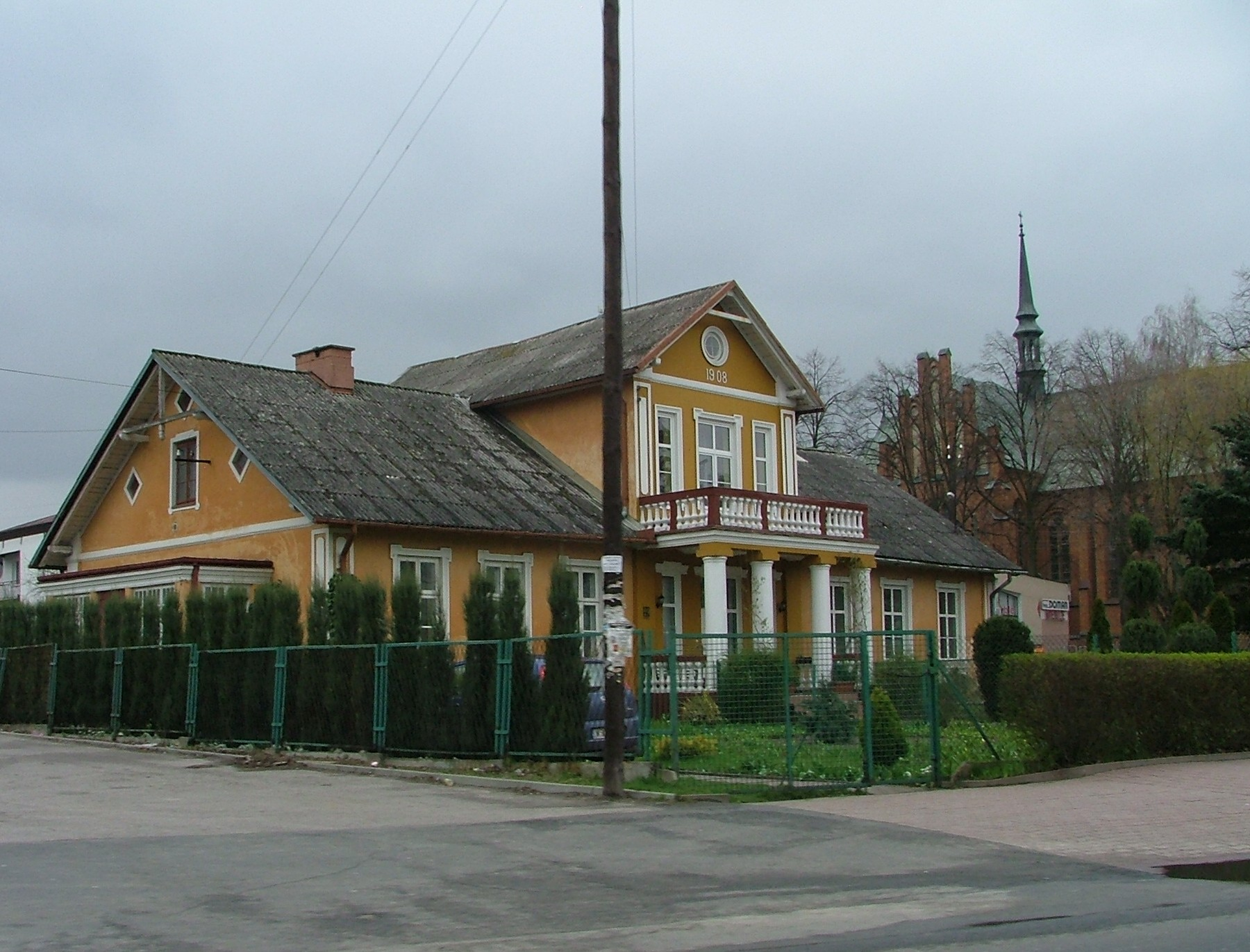 Ryki, woj. lubelskie - stara plebania